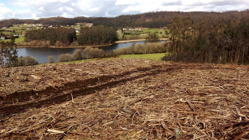 Castro de Loiravella, Valdoviño.